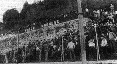 Gradinata del veccchio S.Girolamo nei primi anni '80.